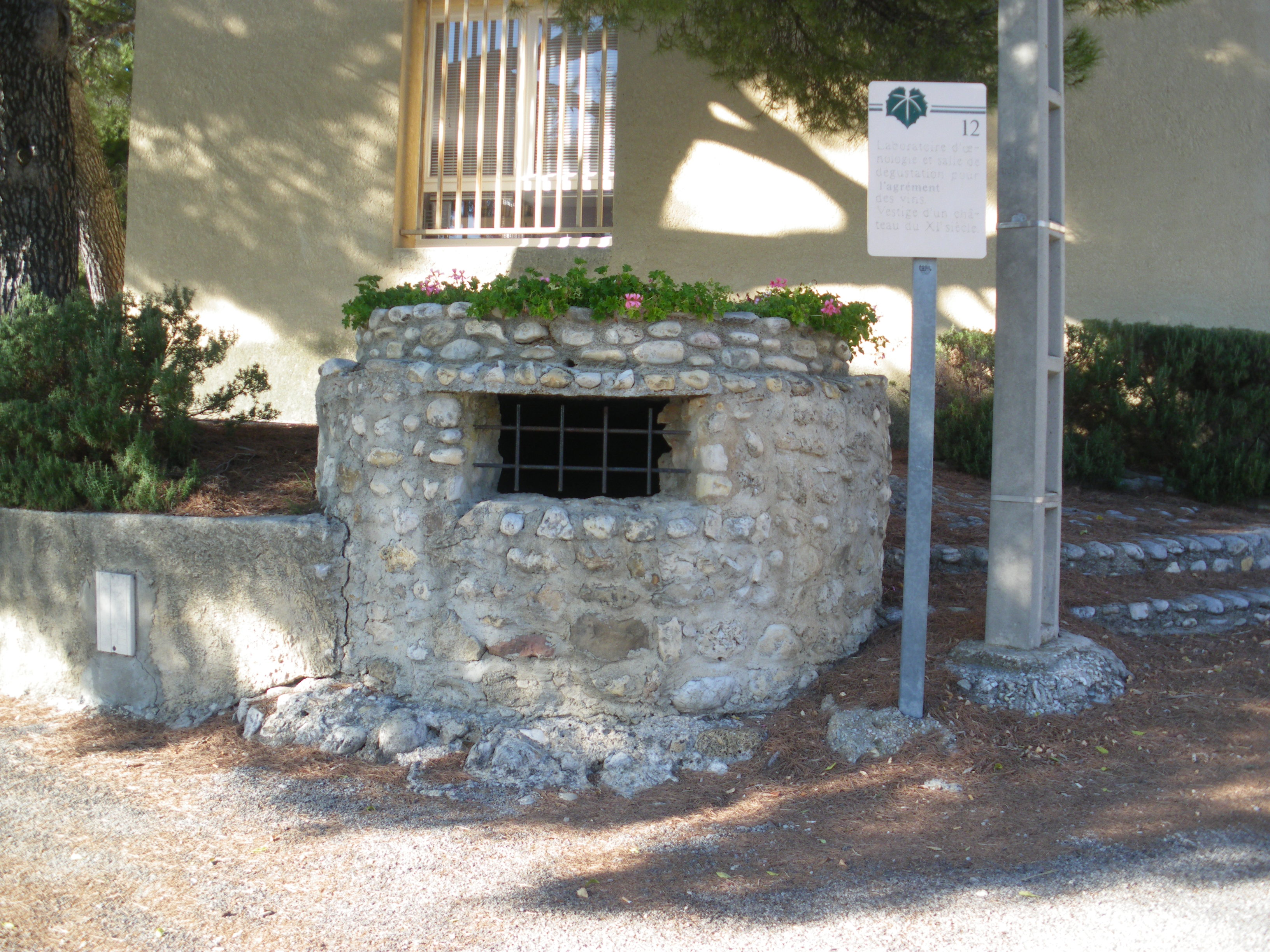 Vestige du château de Rastau, Vaucluse, France